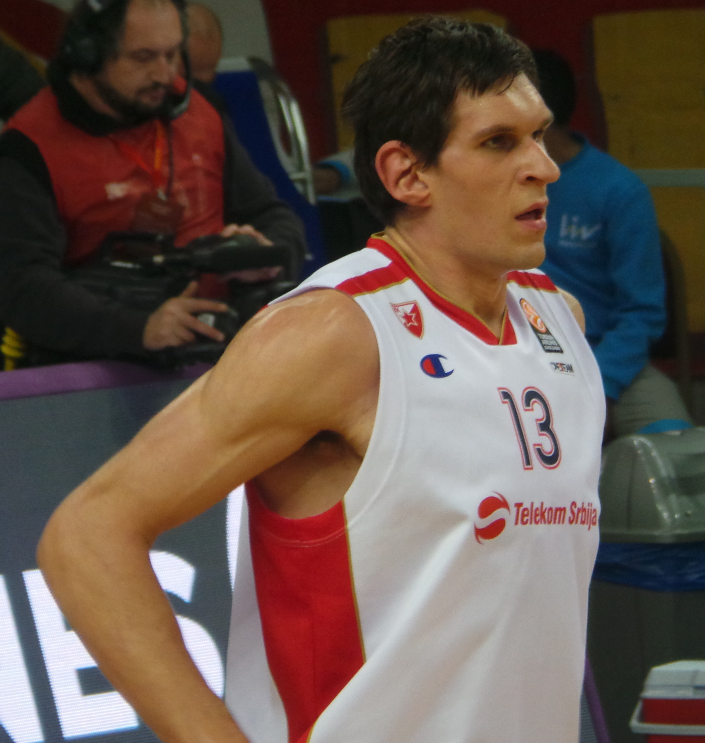 Boban Marjanović